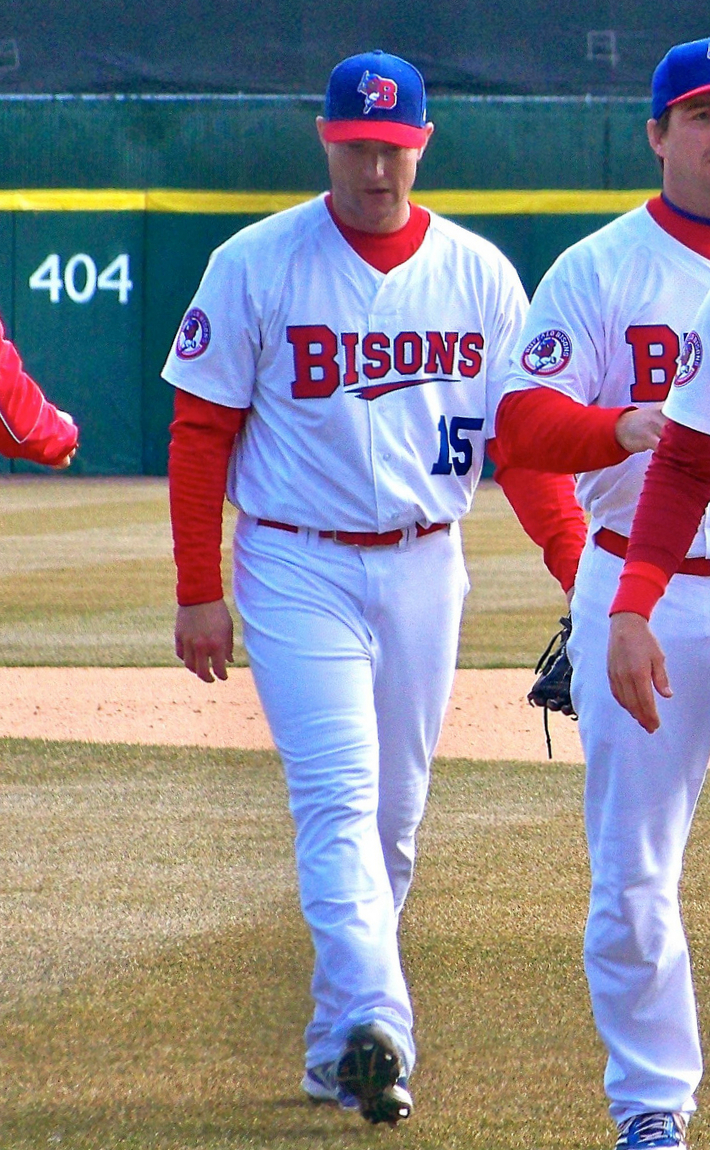 Neil Wagner